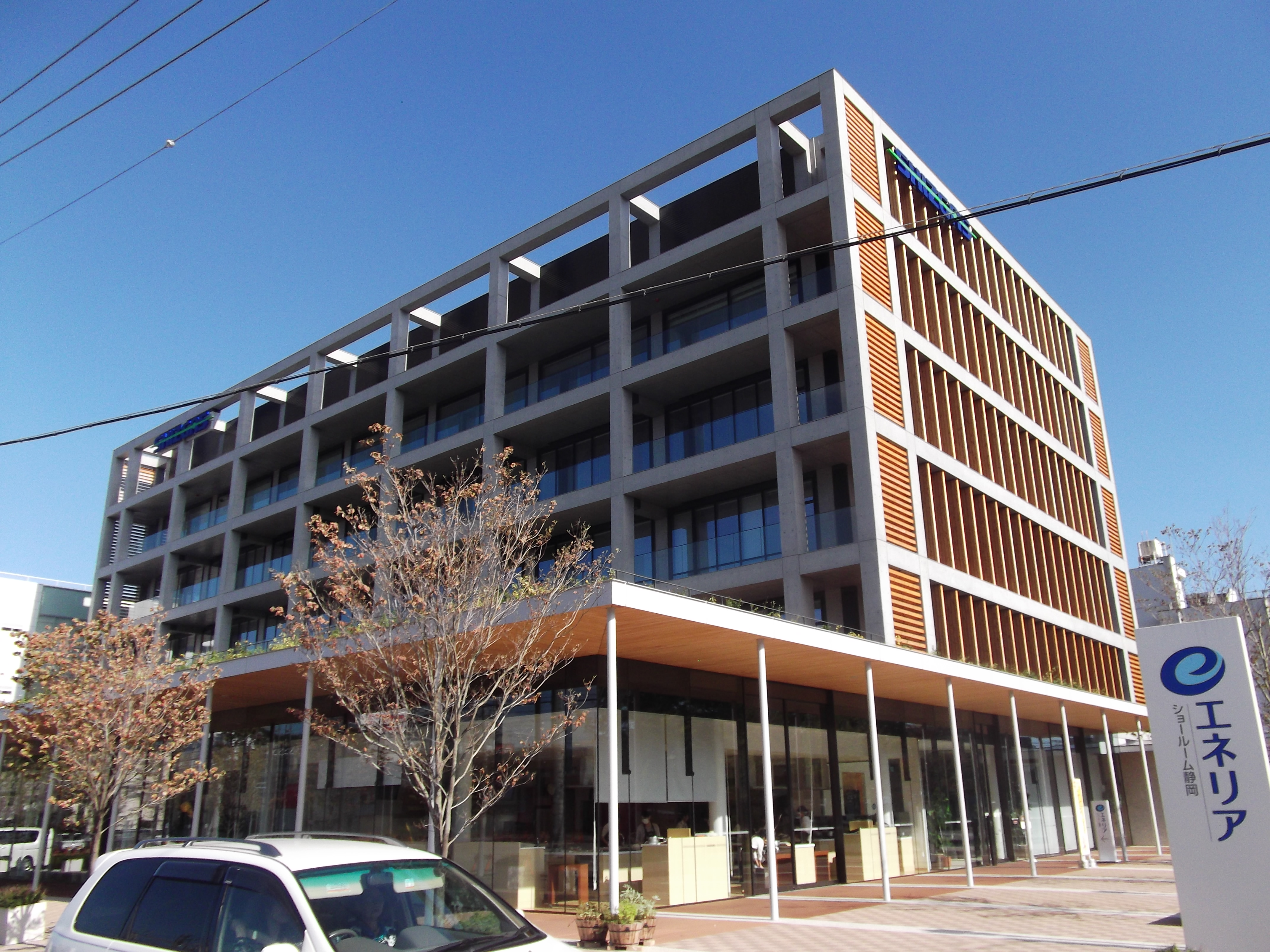 静岡ガス本社ビル（静岡市駿河区八幡）